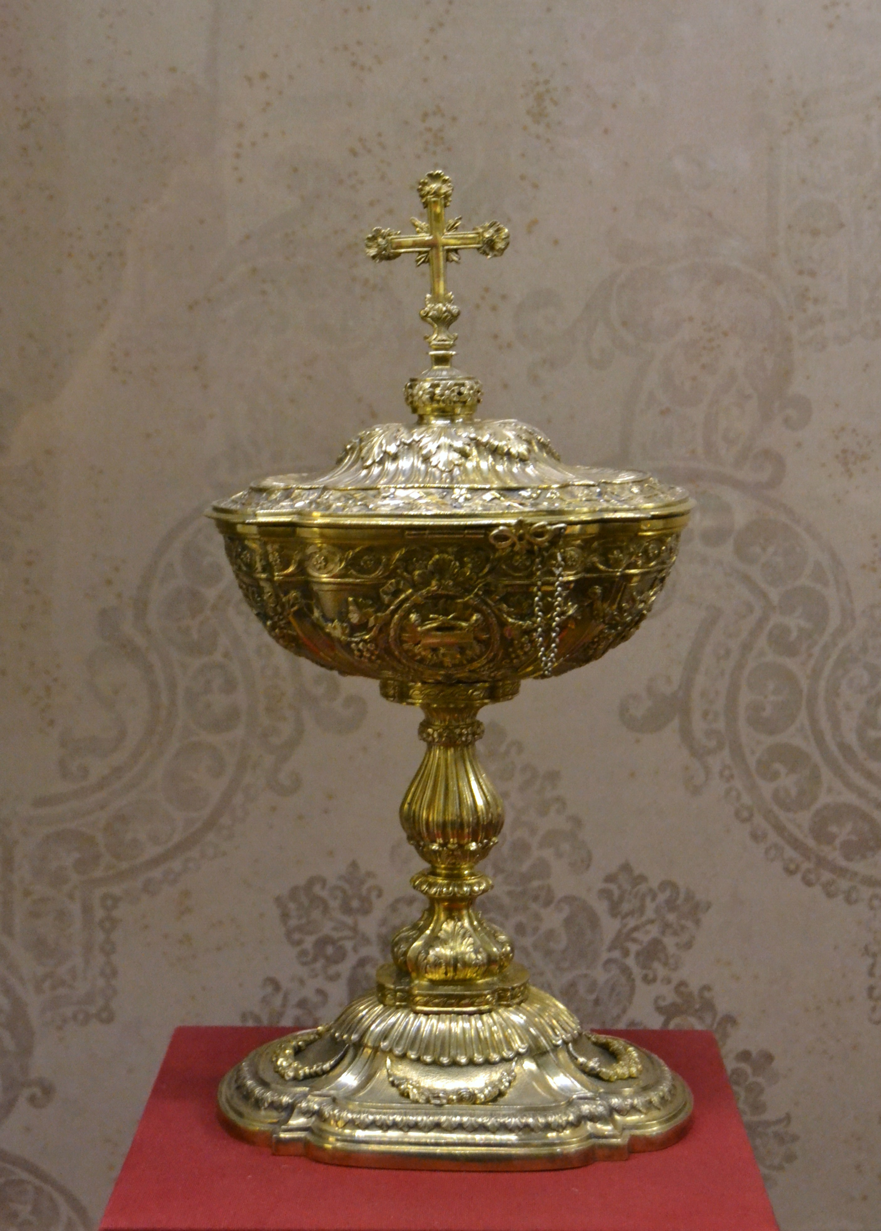 Copó, Ferran Martínez (argenter de València), cap a 1784. Argent sobredaurat; 35 x 16 x 13 cm. Donació del bisbe Josep Tormo Julià (1721 - 1796) després del seu ús en la cerimònia de consagració del temple. Museu de la mare de Déu, Elx.